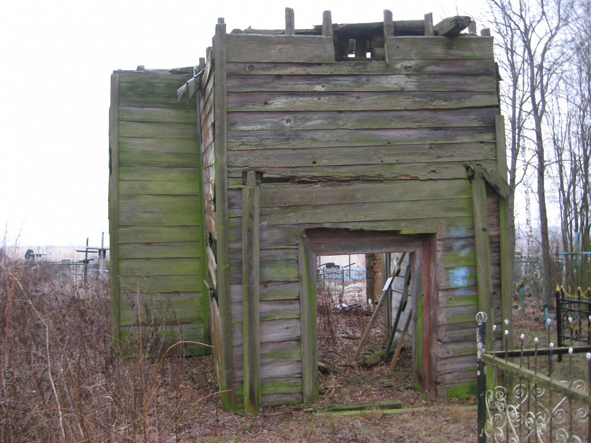 Селішча. Рэшткі Успенскай царквы